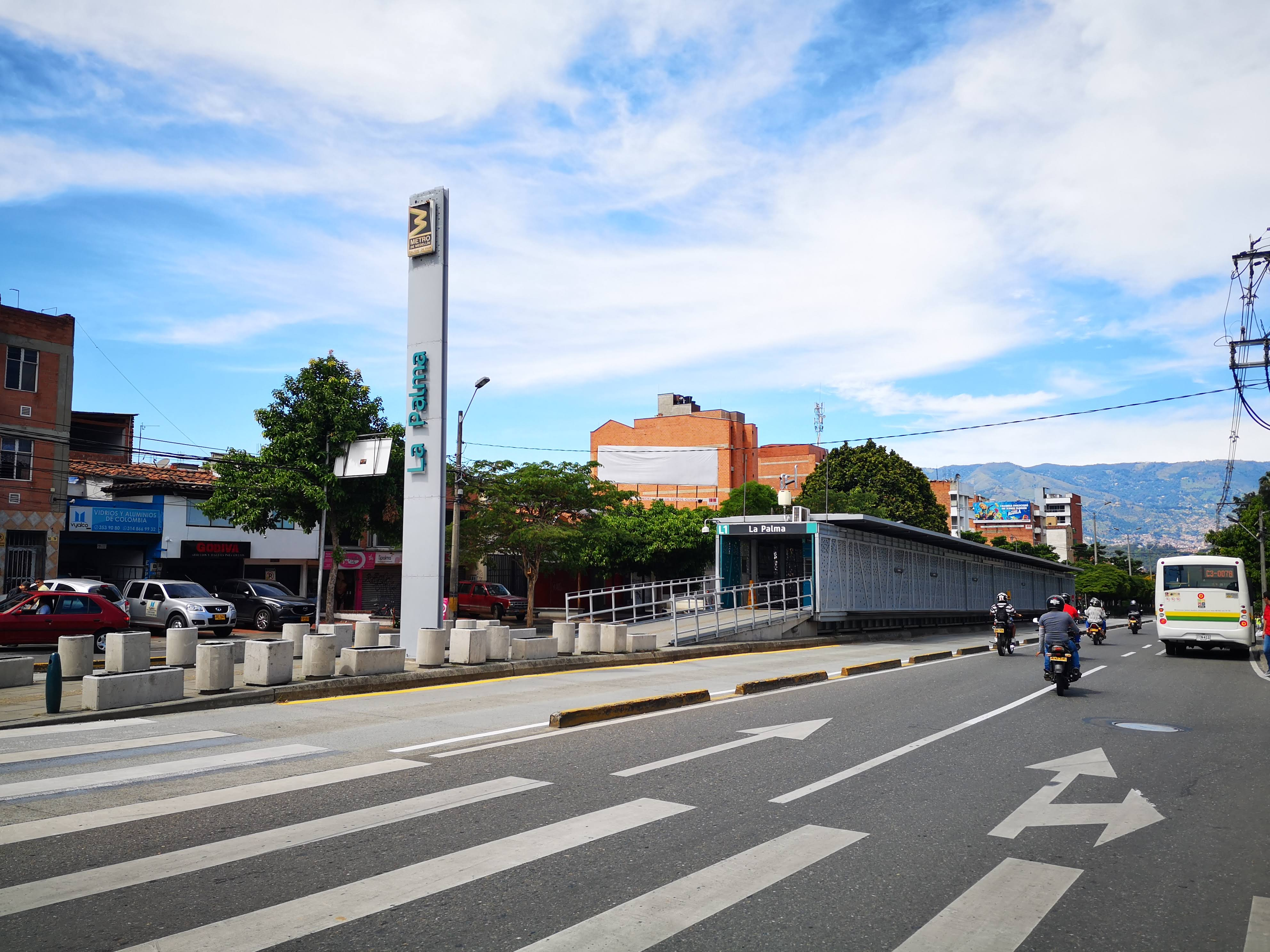 Aspecto de la estación La Palma del Metroplús en Medellín, vista desde la Calle 30 hacia el oriente.